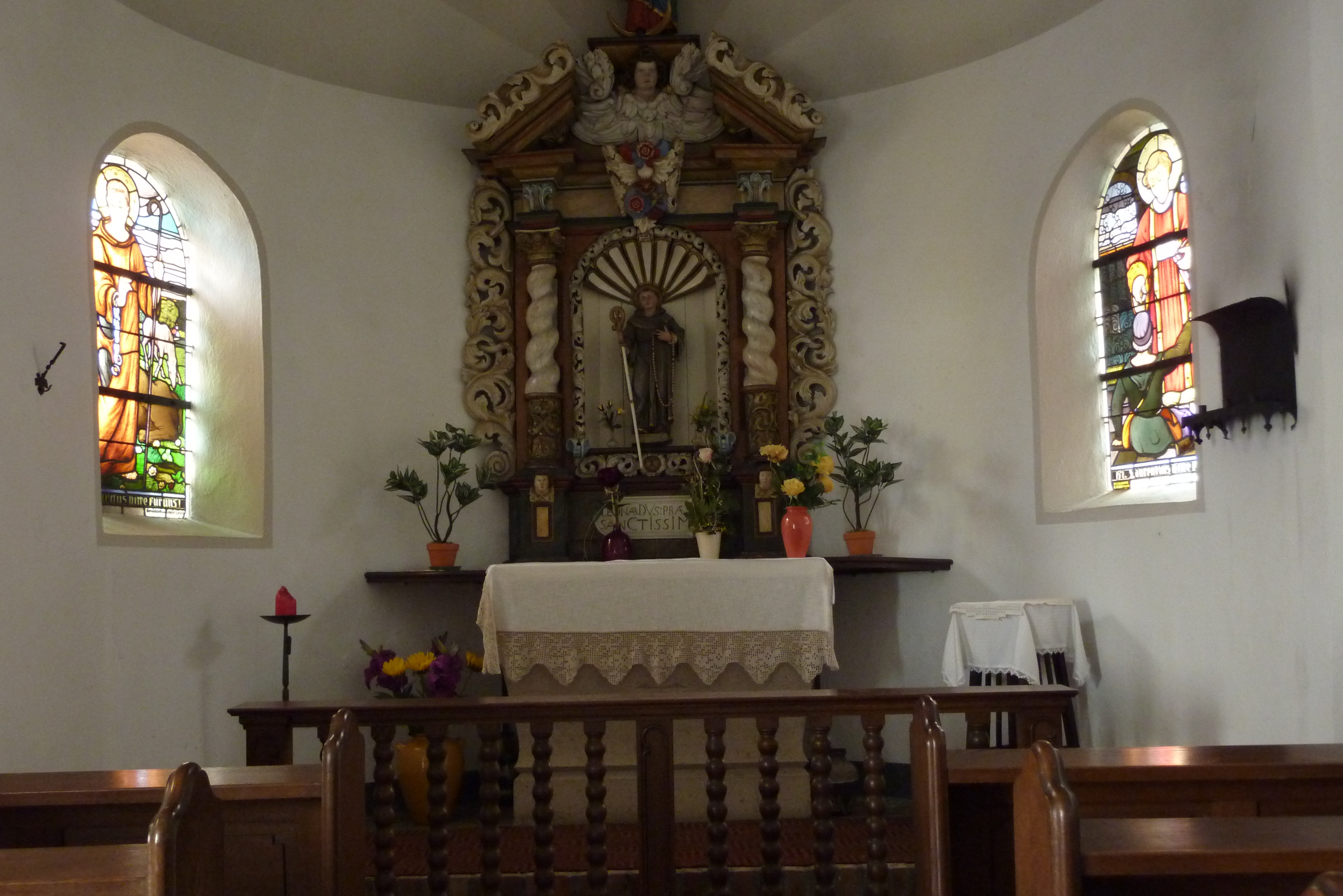 St. Leonardus-Kapelle in Bachem, einem Ortsteil von Bad Neuenahr-Ahrweiler, Innenansicht mit Altar